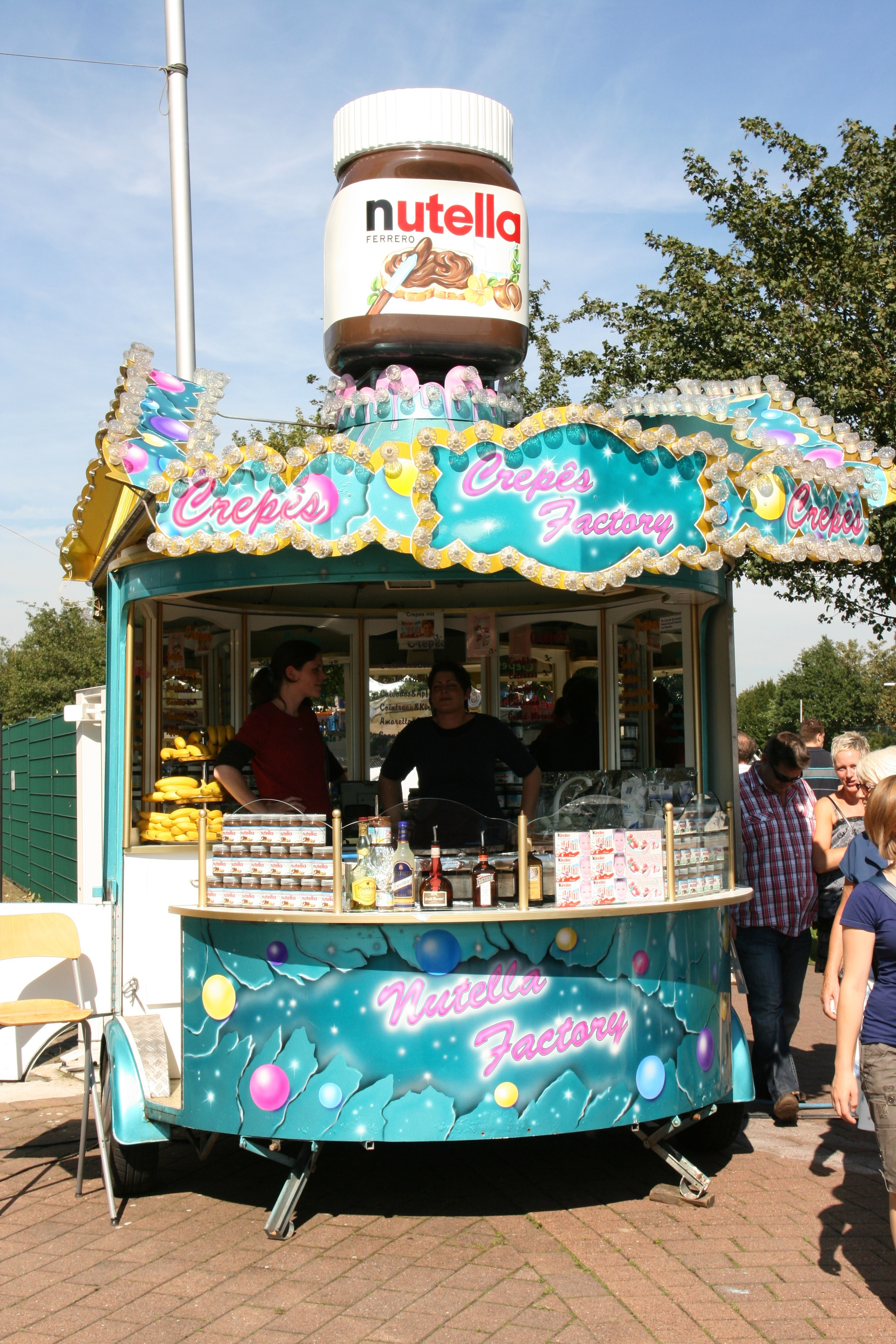 Hafenstraße beim Kanalfestival 2011 in Datteln